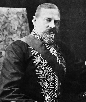 Gustaf Wallenberg (1863-1937)